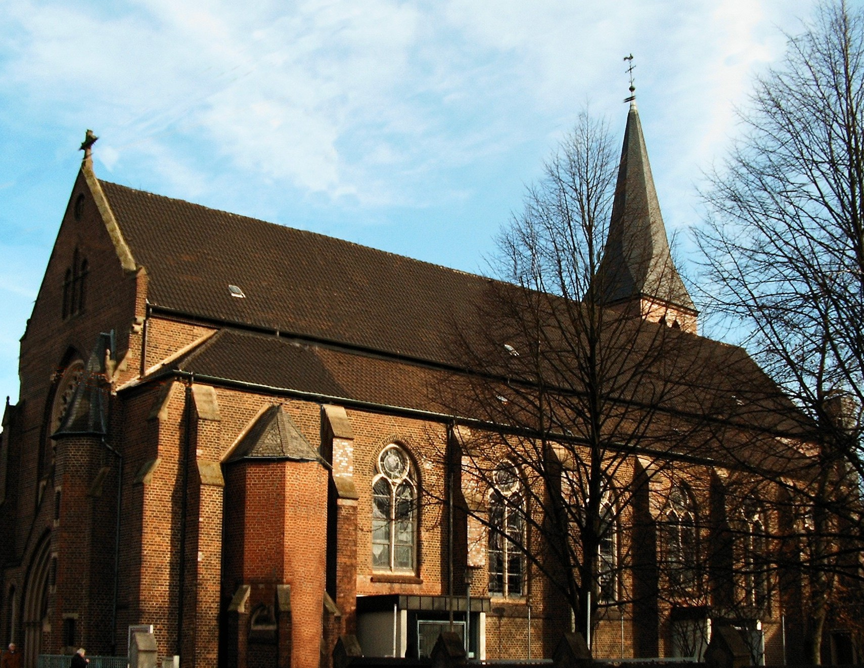 Dortmund-Hombruch: katholische Pfarrkirche St. Clemens